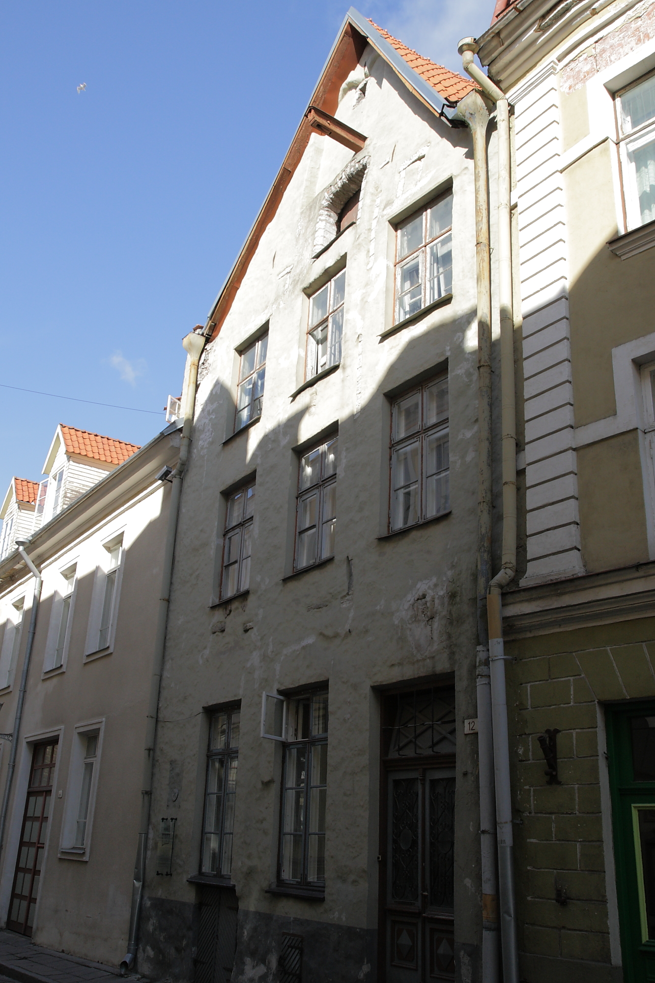 Tallinn, elamu Hobusepea 12, 15.saj., 19.saj